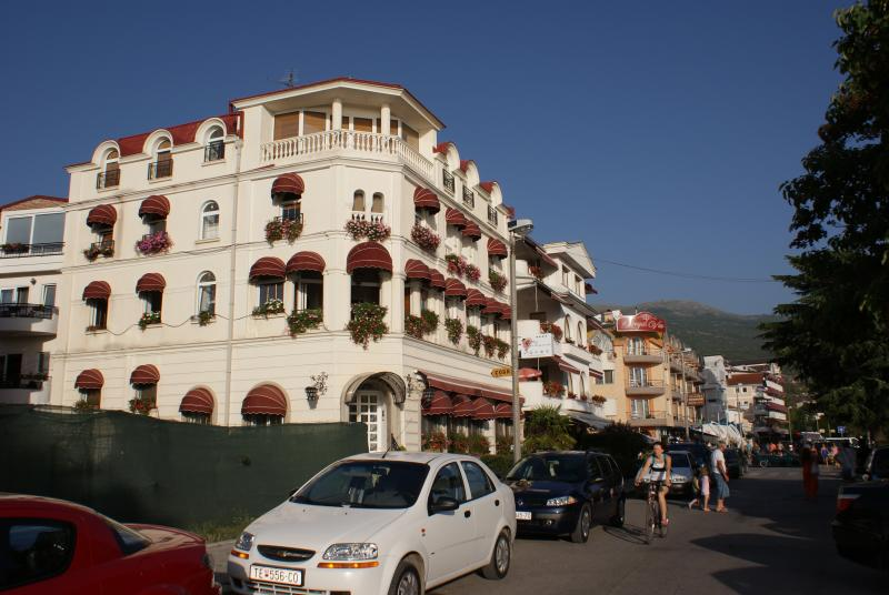 Ohrid, Macedonia